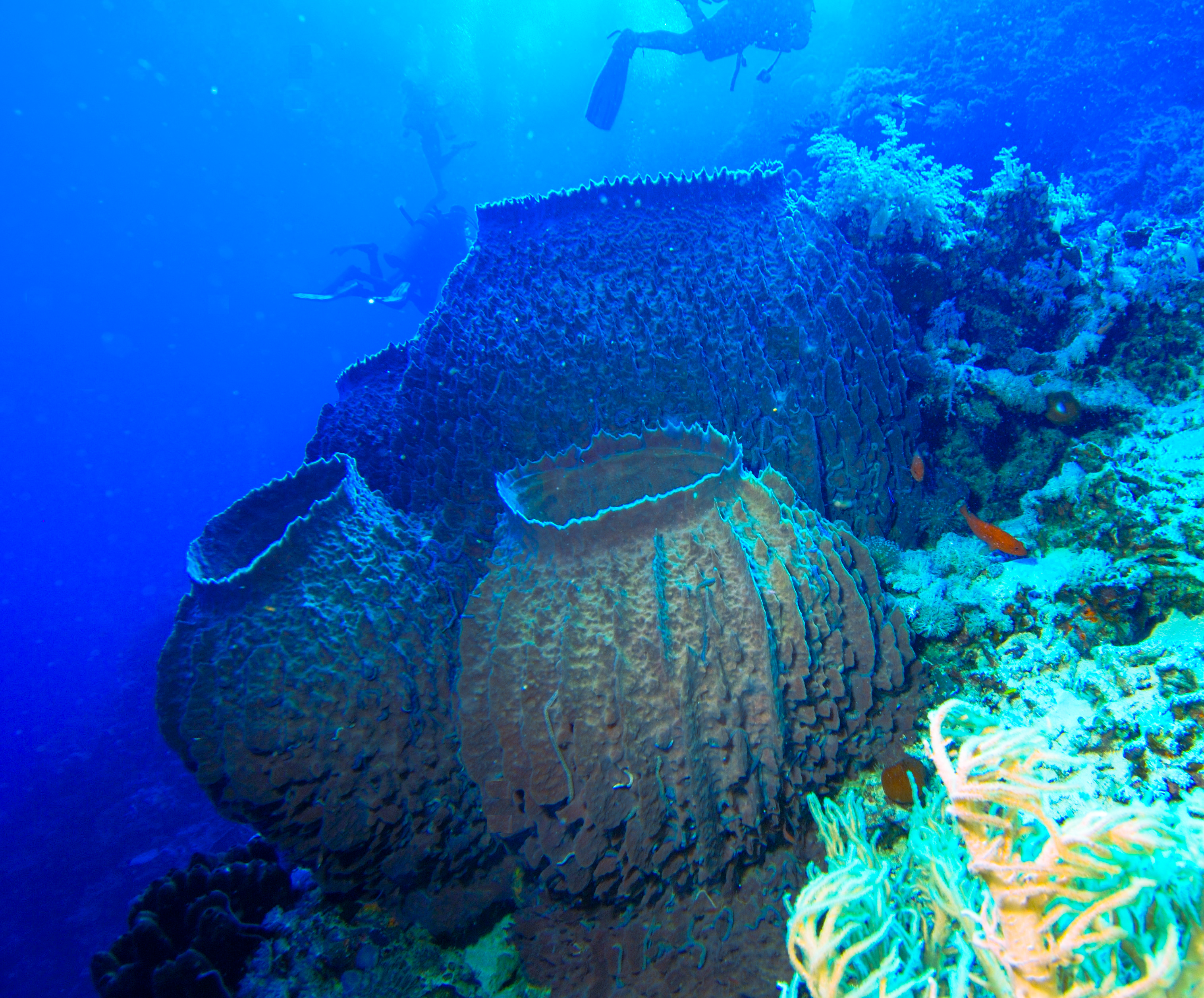 Vaassponzen (xestospongia testudinaria)